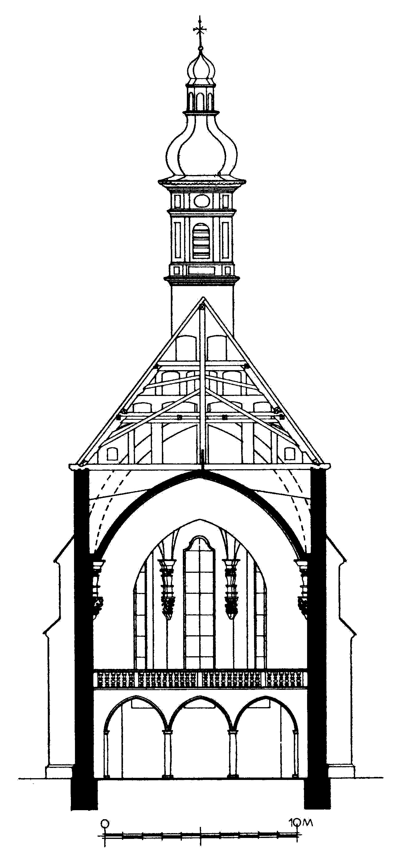 Querschnitt der ehemaligen Reichskartausenkirche St. Maria im oberschwäbischen Buxheim